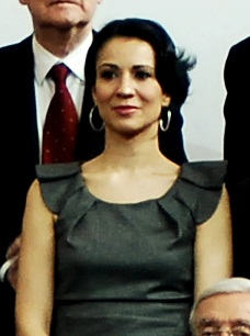 Tesoros vivos de la televisión